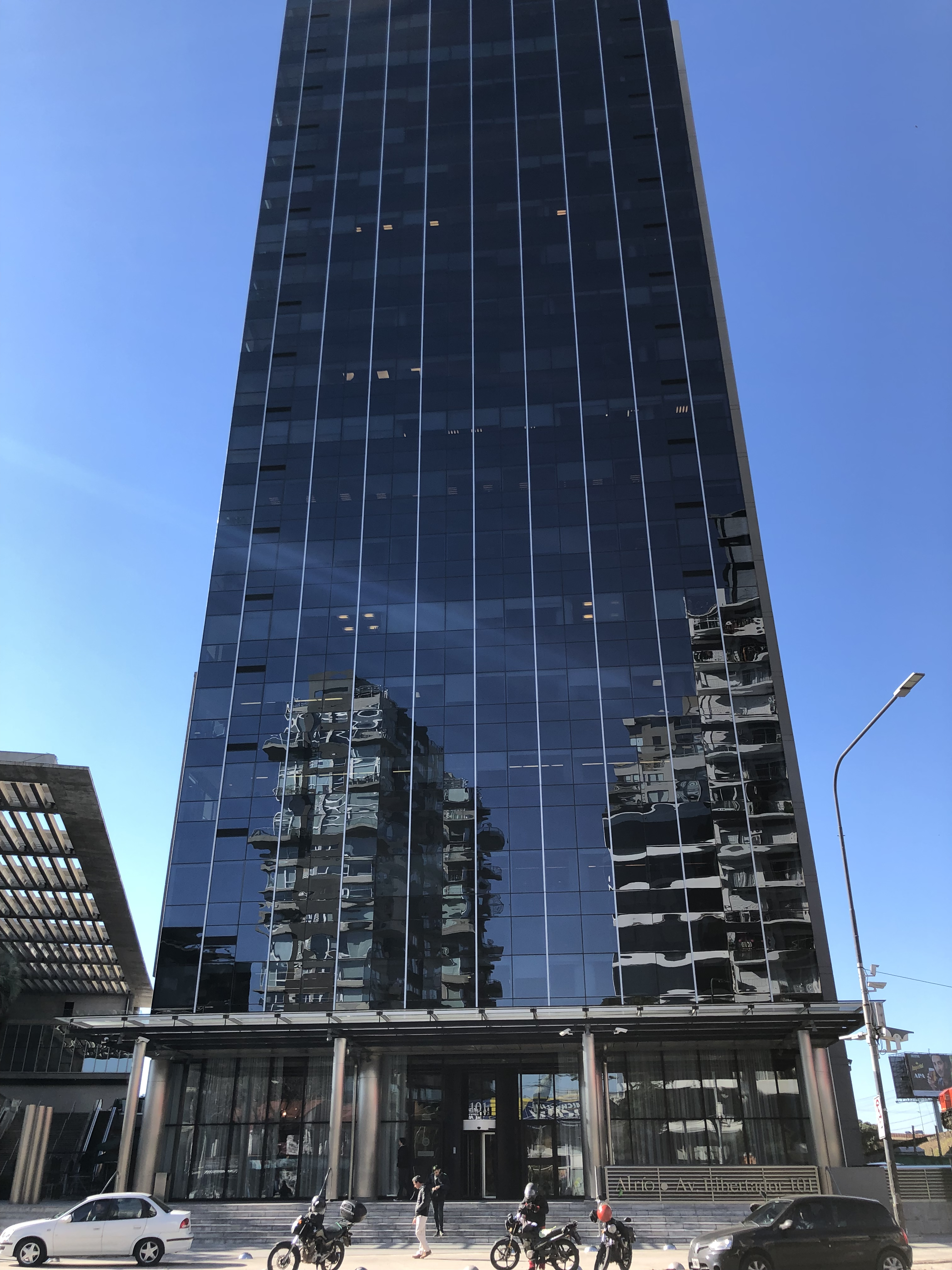 Torre que forma parte del Complejo Al Río, ubicado en Vicente López, Buenos Aires